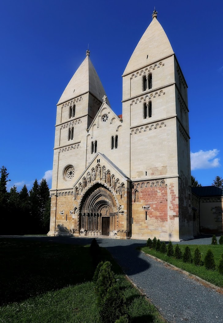 A templom nyugat felől